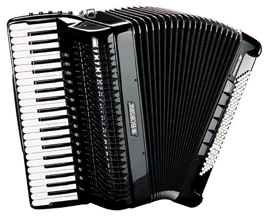 Готово-выборный аккордеон. Профессиональный аккордеон.